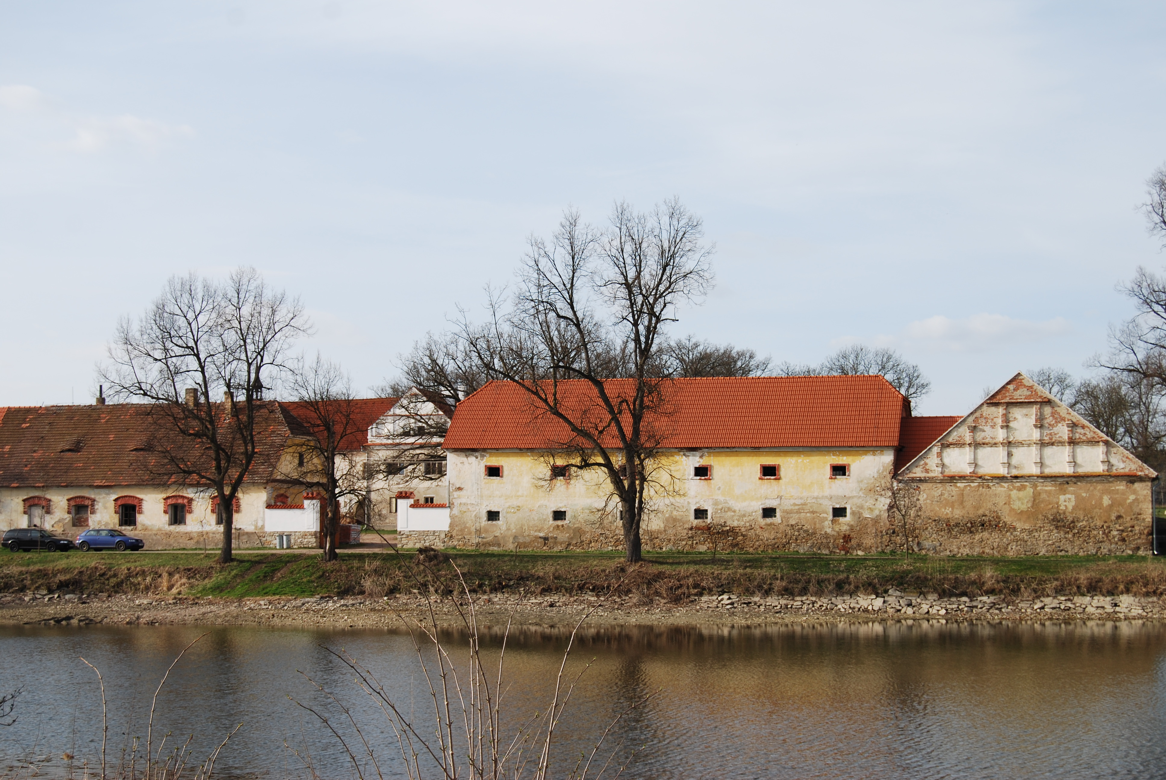 Pohled na část obce. Červený Újezdec je osada, část obce Vlastec v okrese Písek. Česká republika.